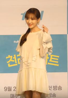 16일 오전 서울시 마포구 도화동 베스트웨스턴프리미어 서울가든호텔에서 tvN 새 금요드라마 '쌉니다 천리마마트' 제작발표회가 열려 배우 가 참석해 포토타임을 갖고 있다.